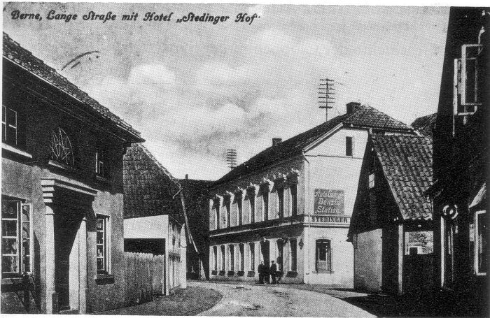 Ansichtskarte von Berne in Niedersachsen